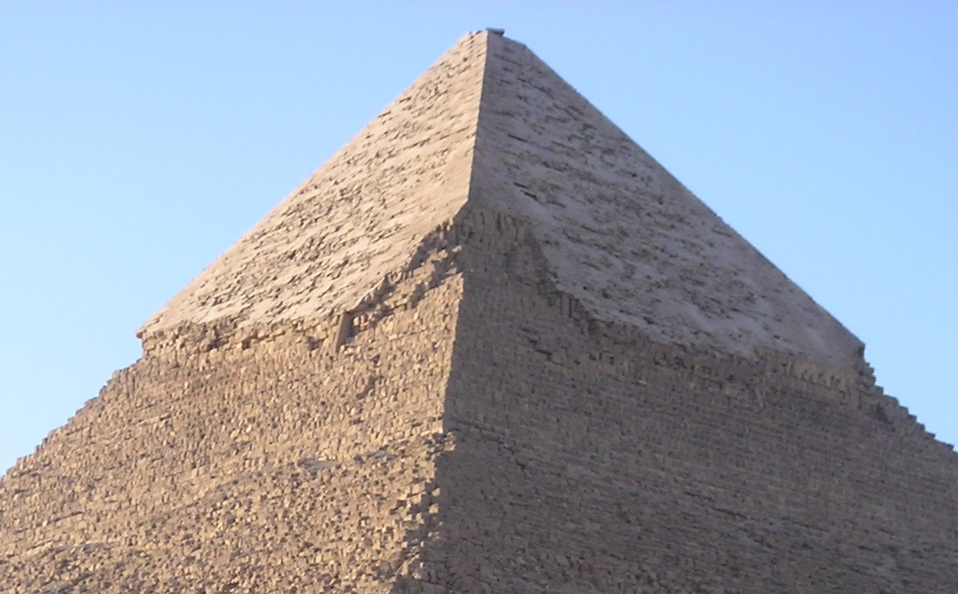 Vue des restes du revêtement en calcaire de tourah de la pyramide de Khéphren à Gizeh - IVe dynastie égyptienne